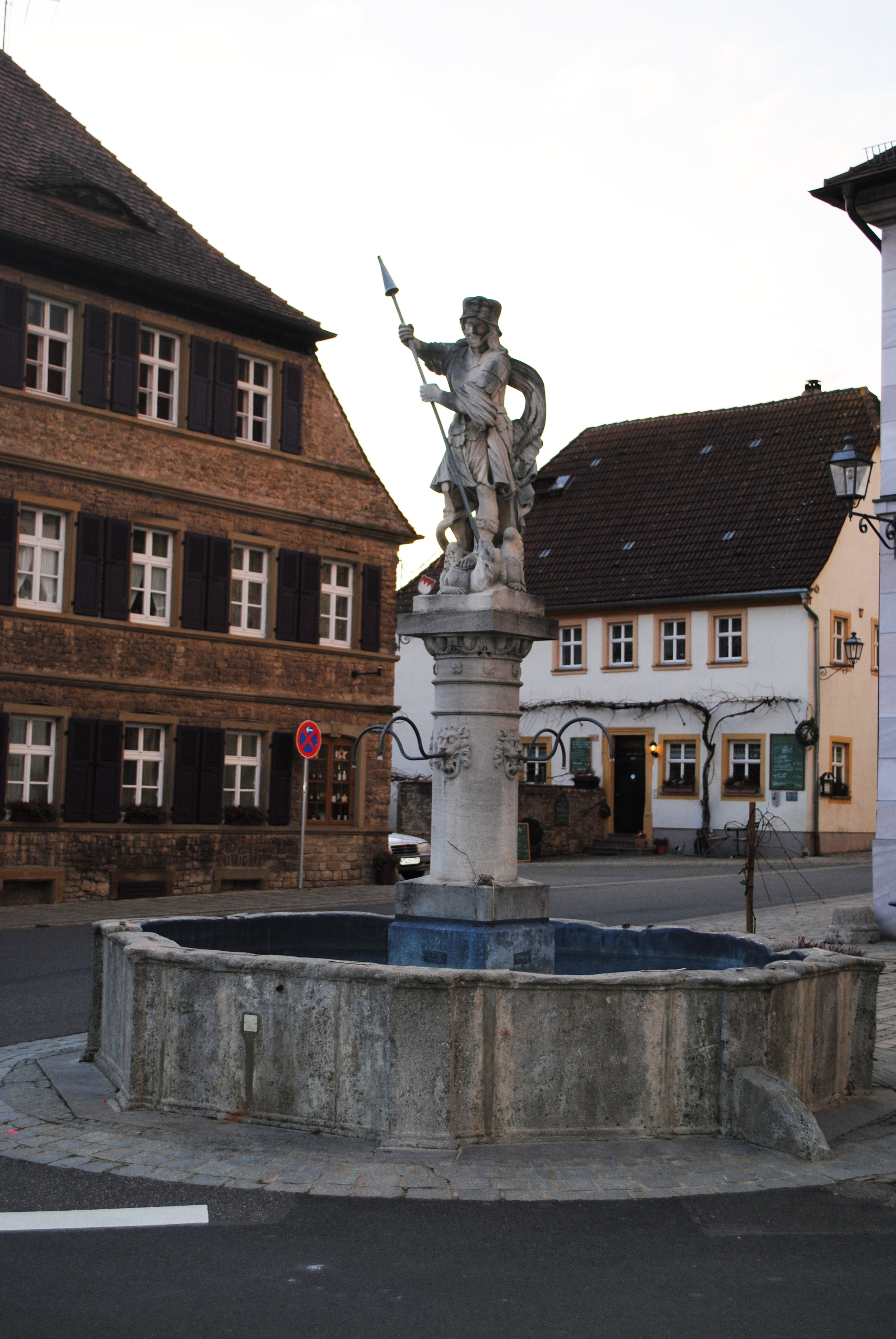 Dorfbrunnen, Hauptstraße, Sommerach, mit Figur des hl. Georg, 1813; D-6-75-169-7